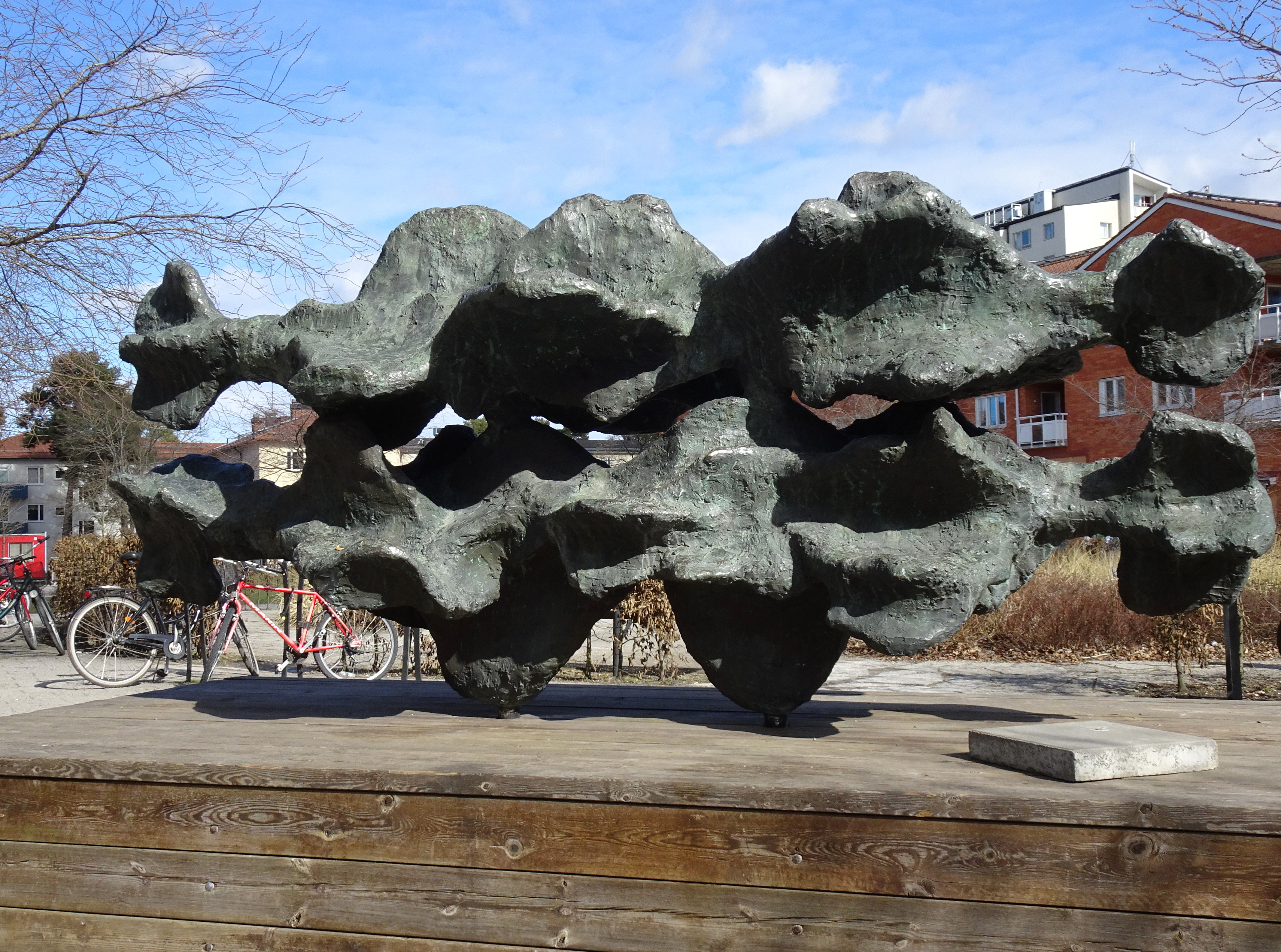 Varandras spegel (1971) av Börje Lindberg This reproduction of an architectural work or work of art, is covered under the Swedish law of copyright for literary and artistic works (Law 1960:729, paragraph 24), which states that "Work of art may be depicted if it is permanently placed on or at a public place outdoors. Buildings may be freely depicted." See Commons:Freedom of panorama#Sweden for more information.